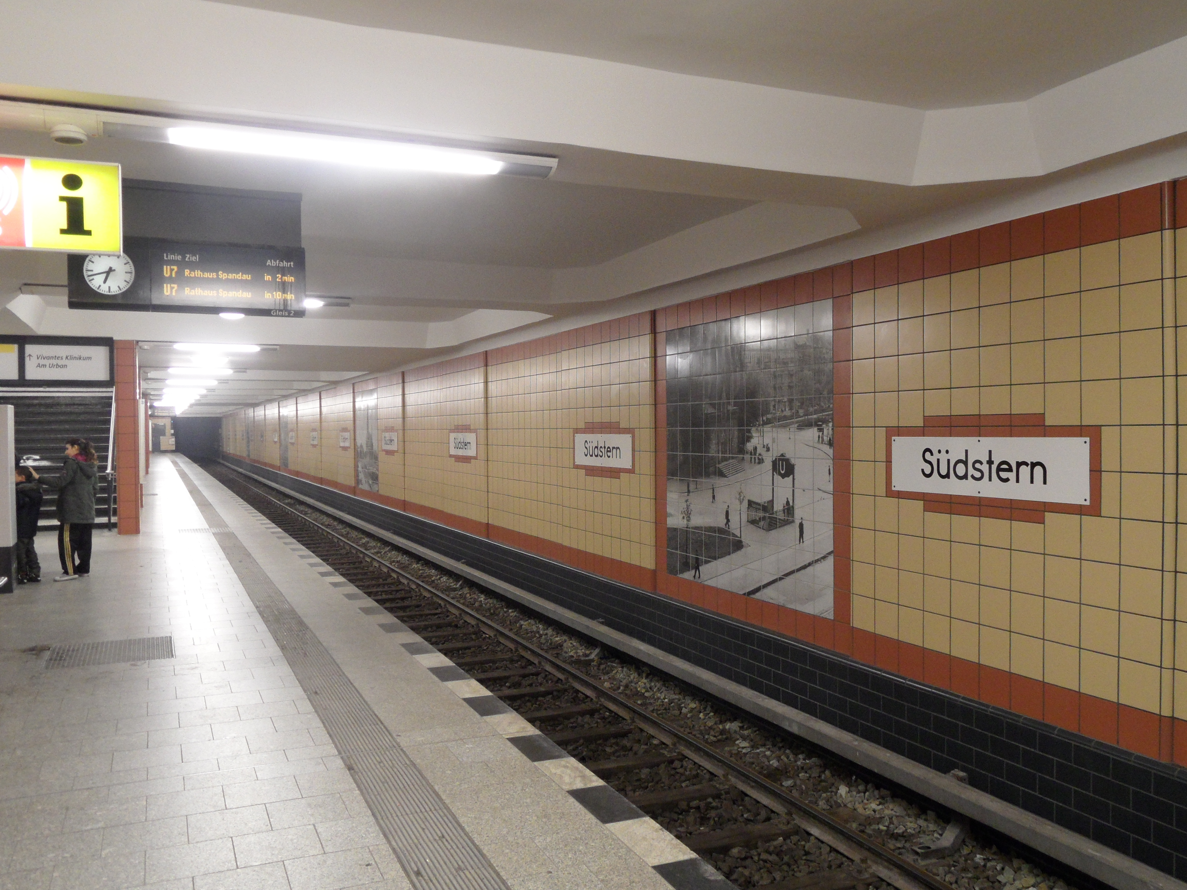 Berlin - U-Bahnhof Südstern - Linie U7